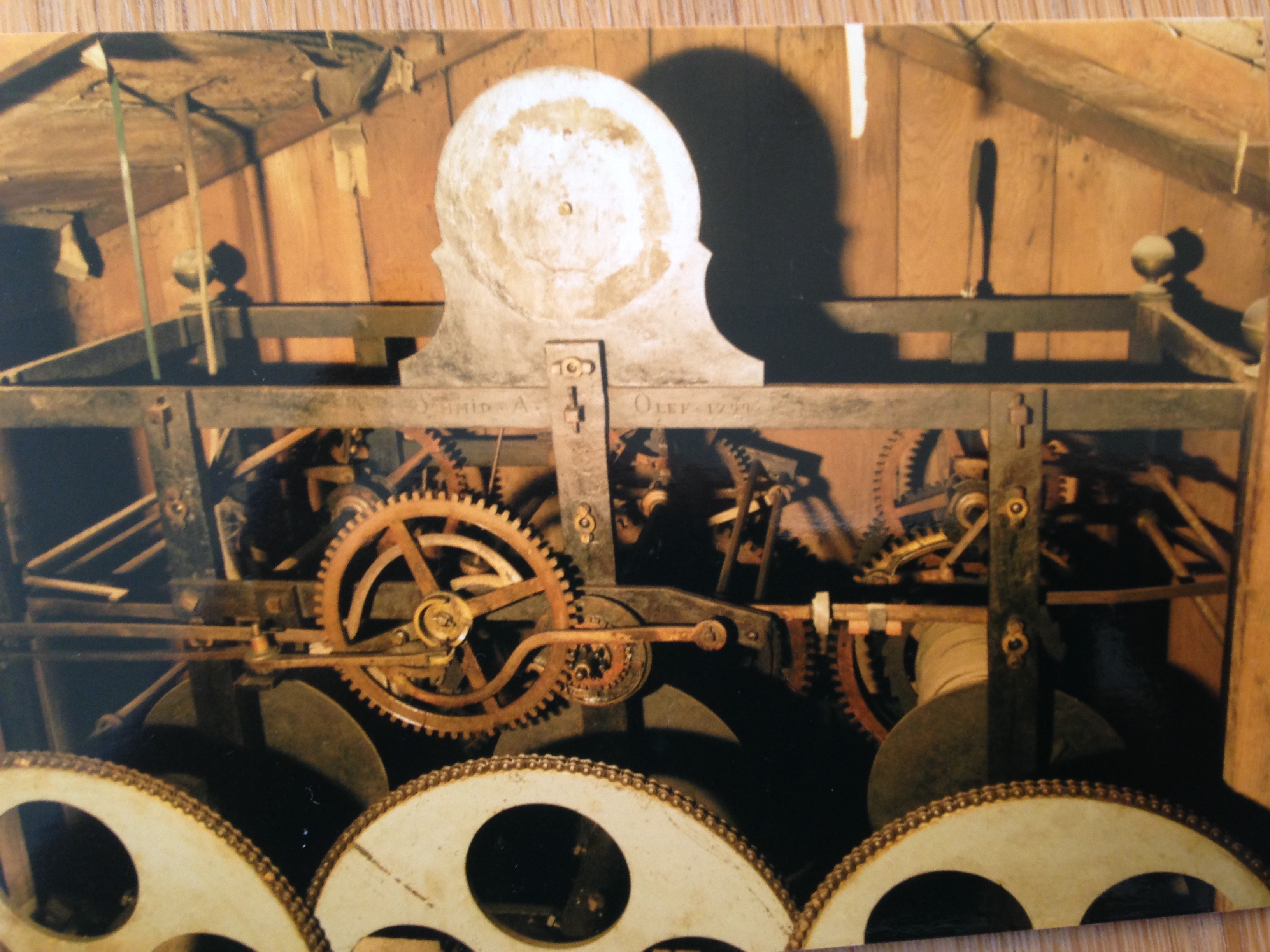 Stadtkirche Monschau; Uhrwerk von 1789